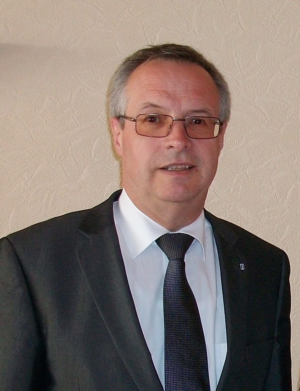 Hubert Kleff, Mitglied des Landtages von Nordrhein-Westfalen und gesundheitspolitischer Sprecher der CDU-Landtagsfraktion sowie Sprecher der CDU-Fraktion im Petitionsausschuss (Germany)